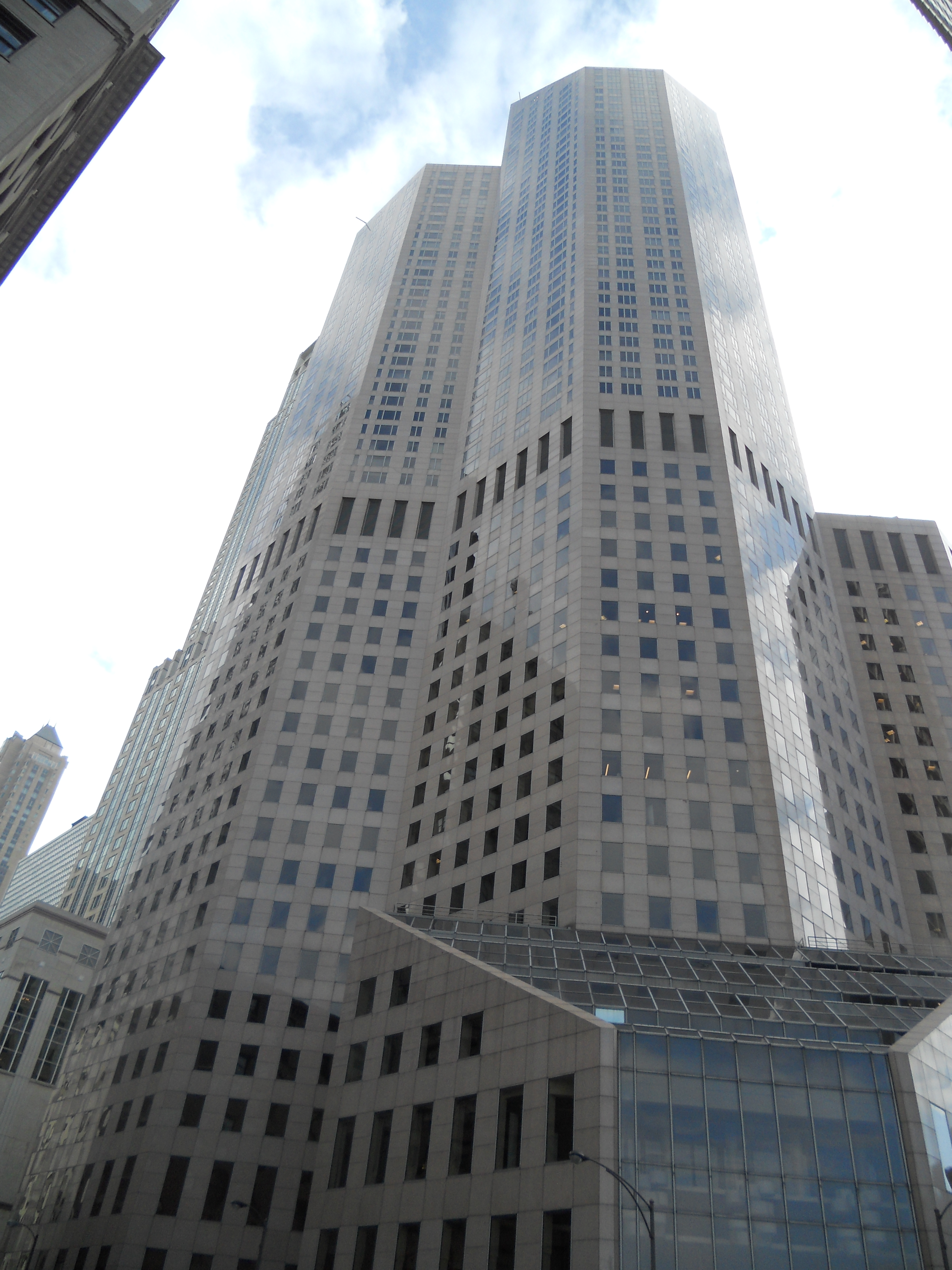 Chicago